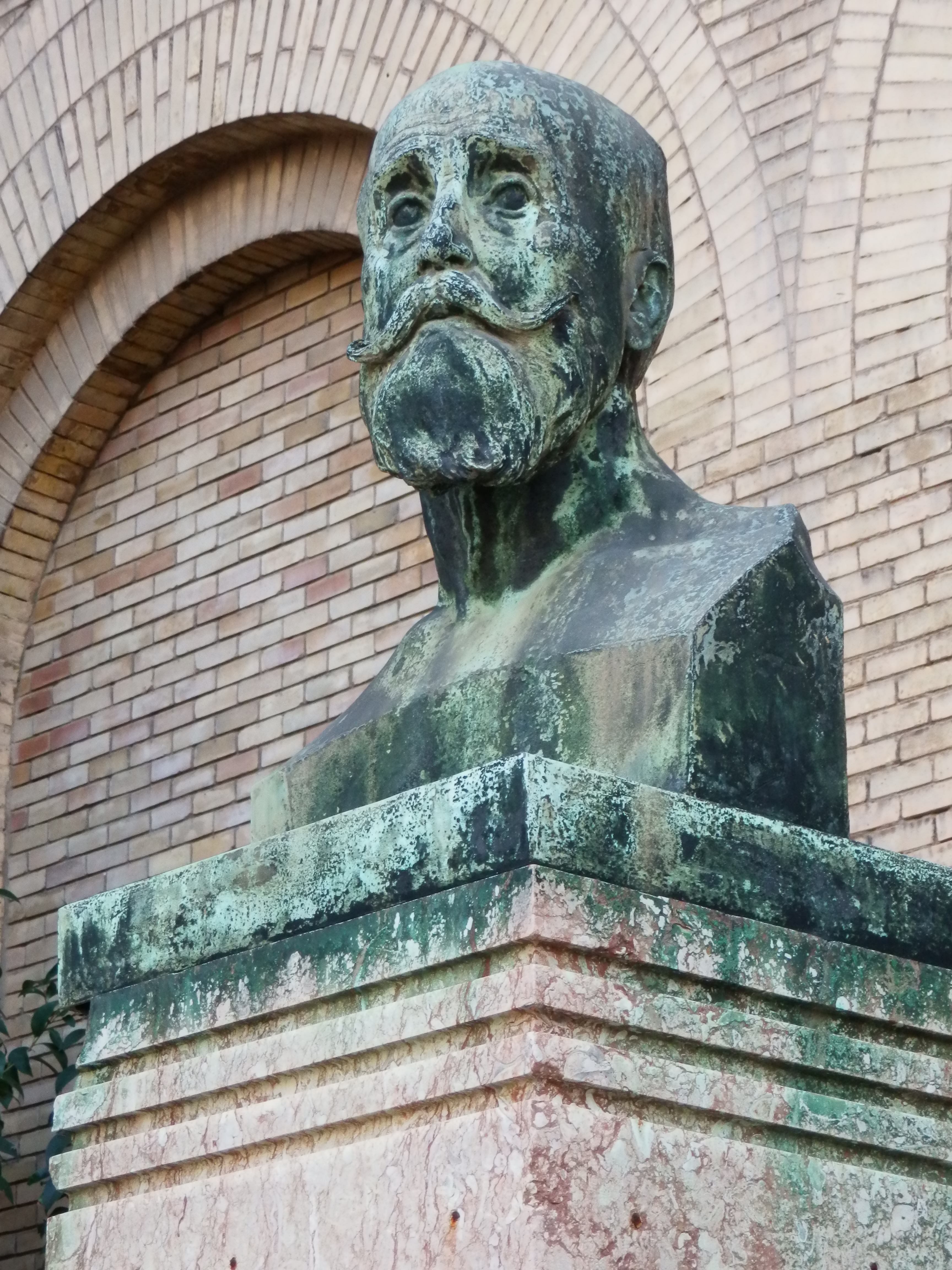 Estatua de Segismundo Moret en Zaragoza.